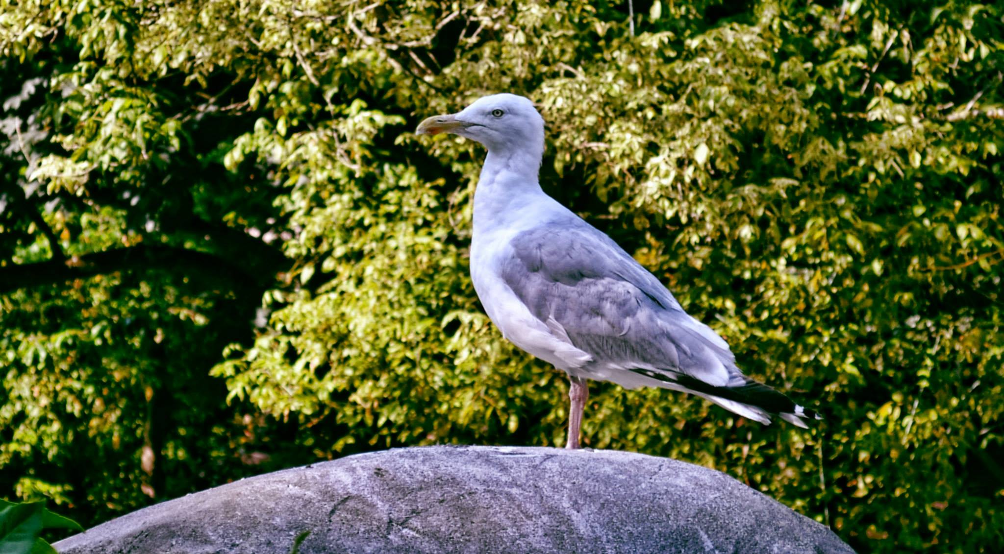 Meeuw in ZOO Antwerpen